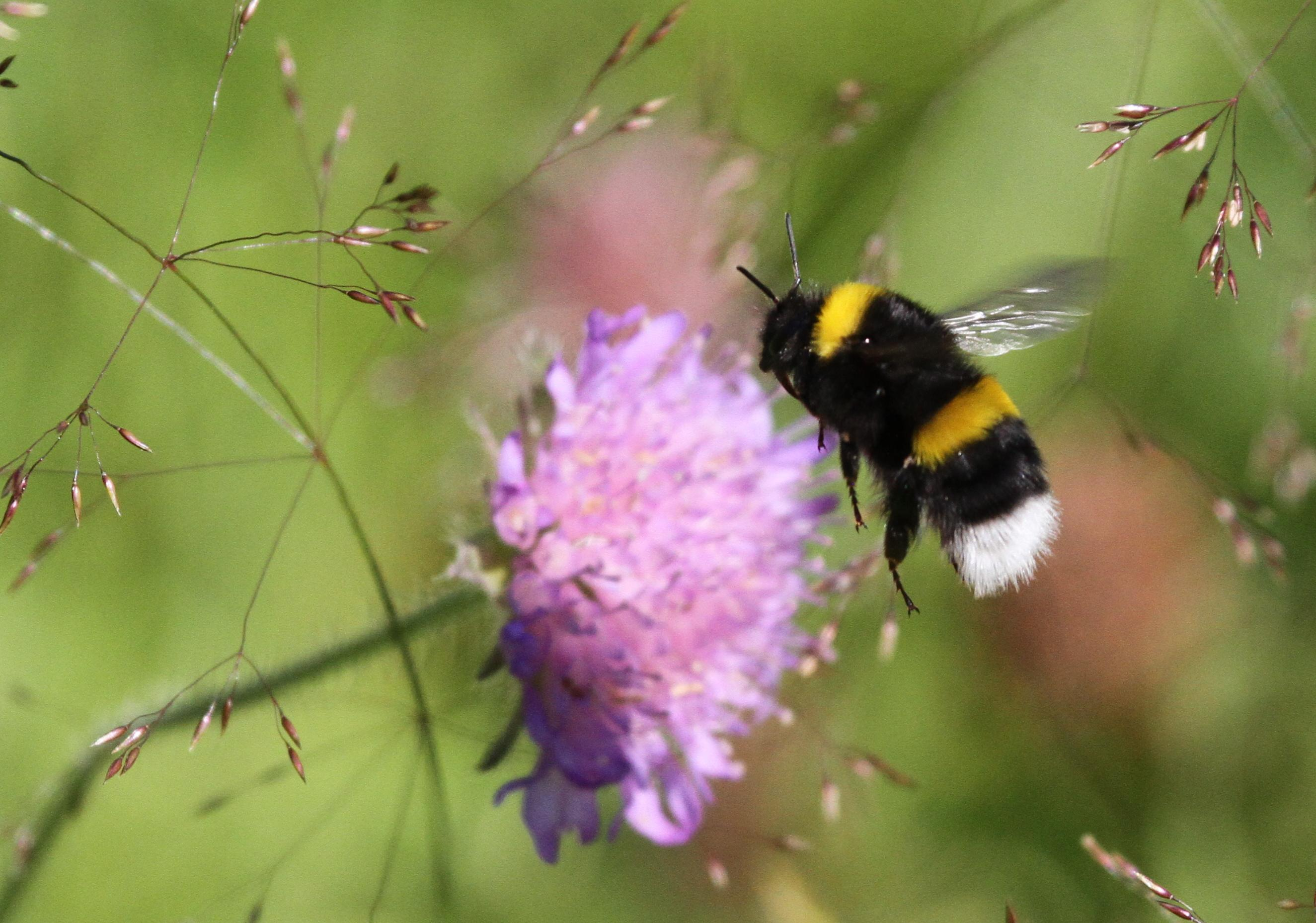 Dronning av lys jordhumle Bombus lucorum på rødknapp, Kongsvoll i Oppdal, Sør-Trøndelag.